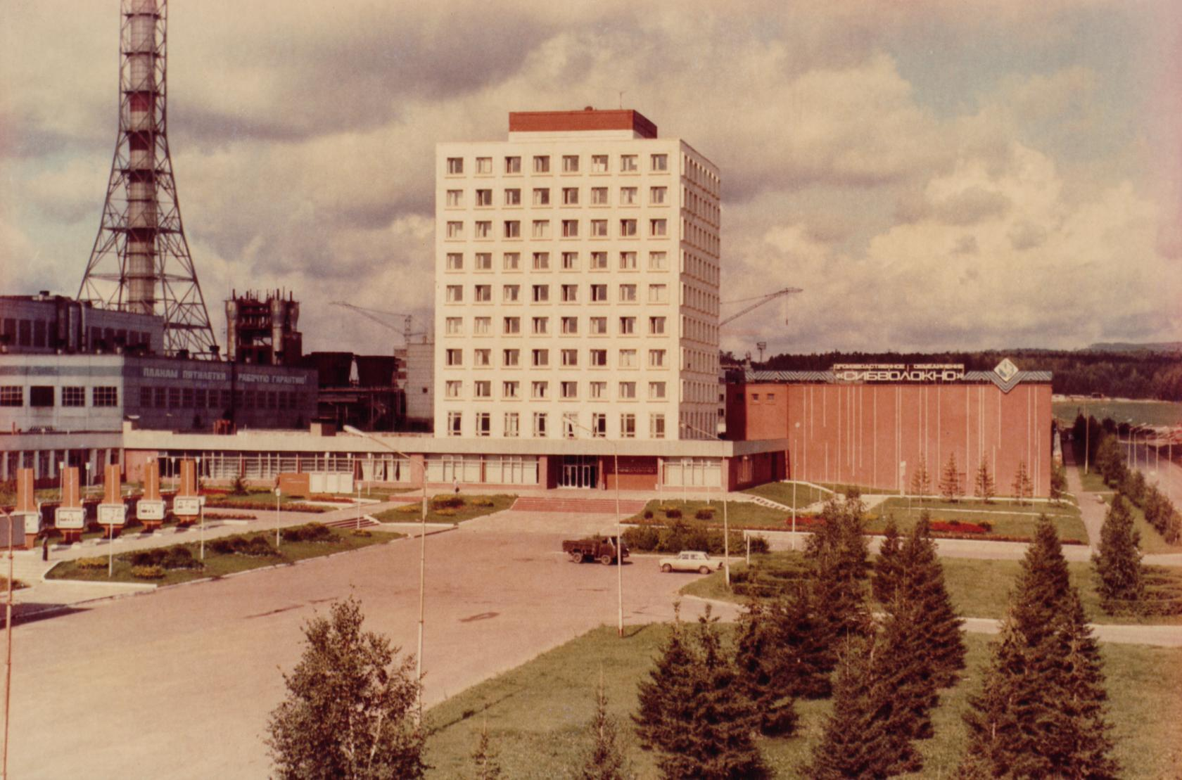 Заводоуправление с актовым залом. На заднем плане текстильный цех, цех рекуперации сероуглерода и вытяжная труба.